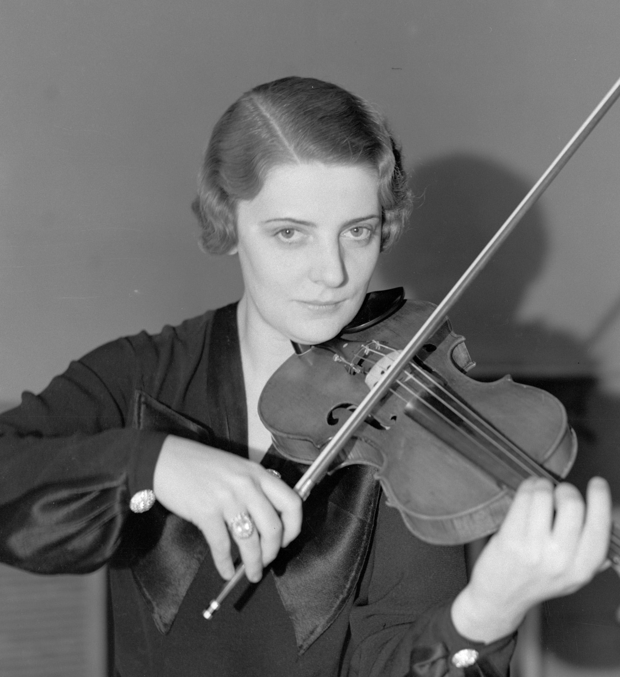 Portret van de violiste Eugenie Uminska spelend voor een microfoon